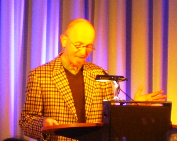 Journalist und Autor Andreas Döring anlässlich der Lesung "Myrderline - Meine Krankheit ist die Schwärze meines Kaffees" von Volker Darnedde am 24. April 2014 im Kleisthaus in Berlin-Mitte